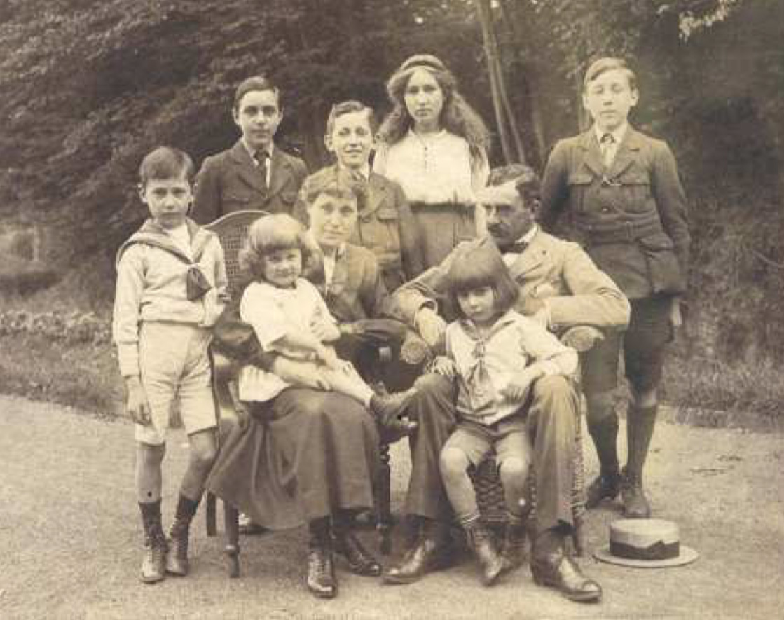 Familieportret van Adolphe Regout, zijn vrouw Jeanne Laloux en hun zeven kinderen, ca. 1921-22.